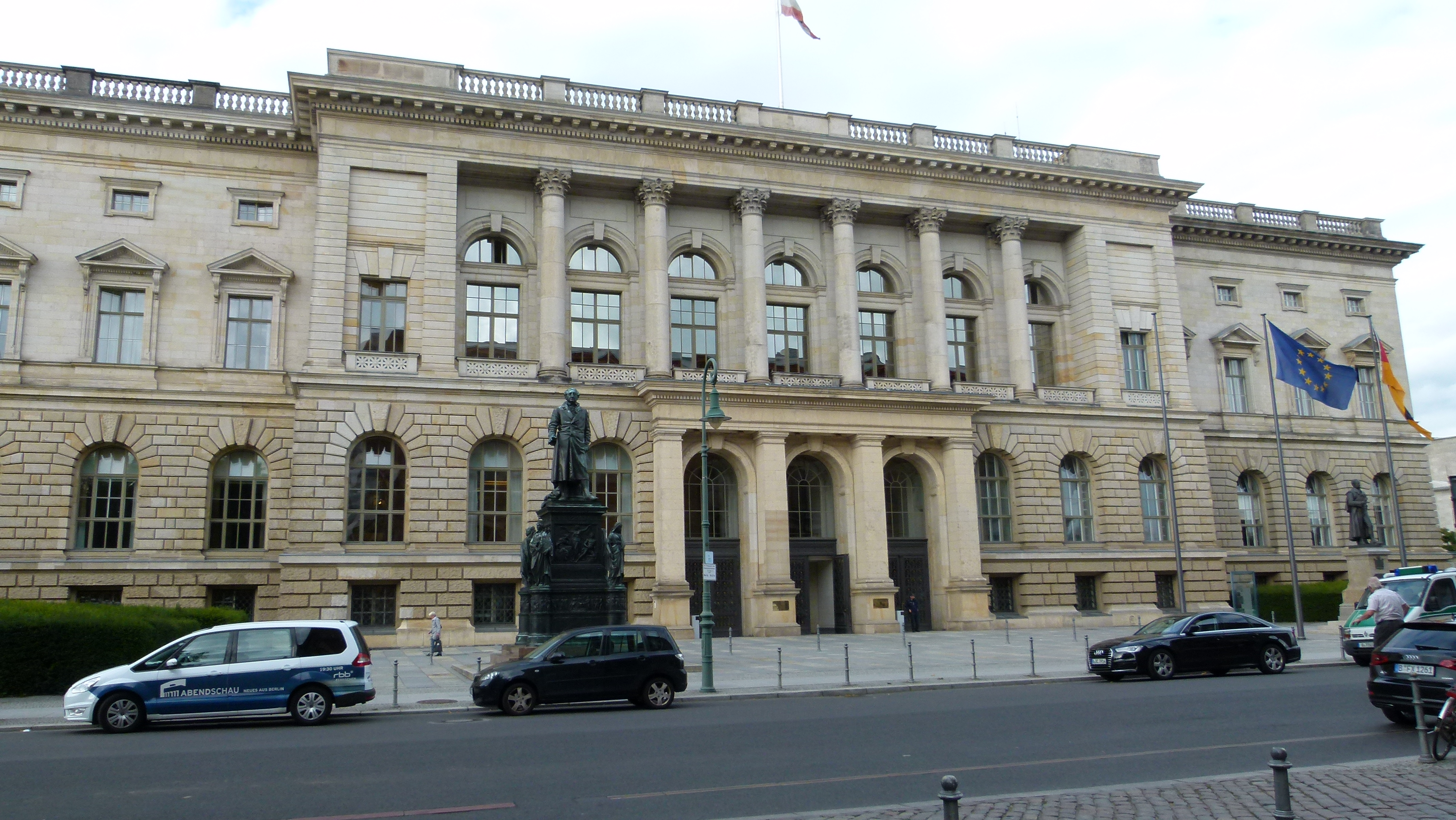 Berliner Abgeordnetenhaus